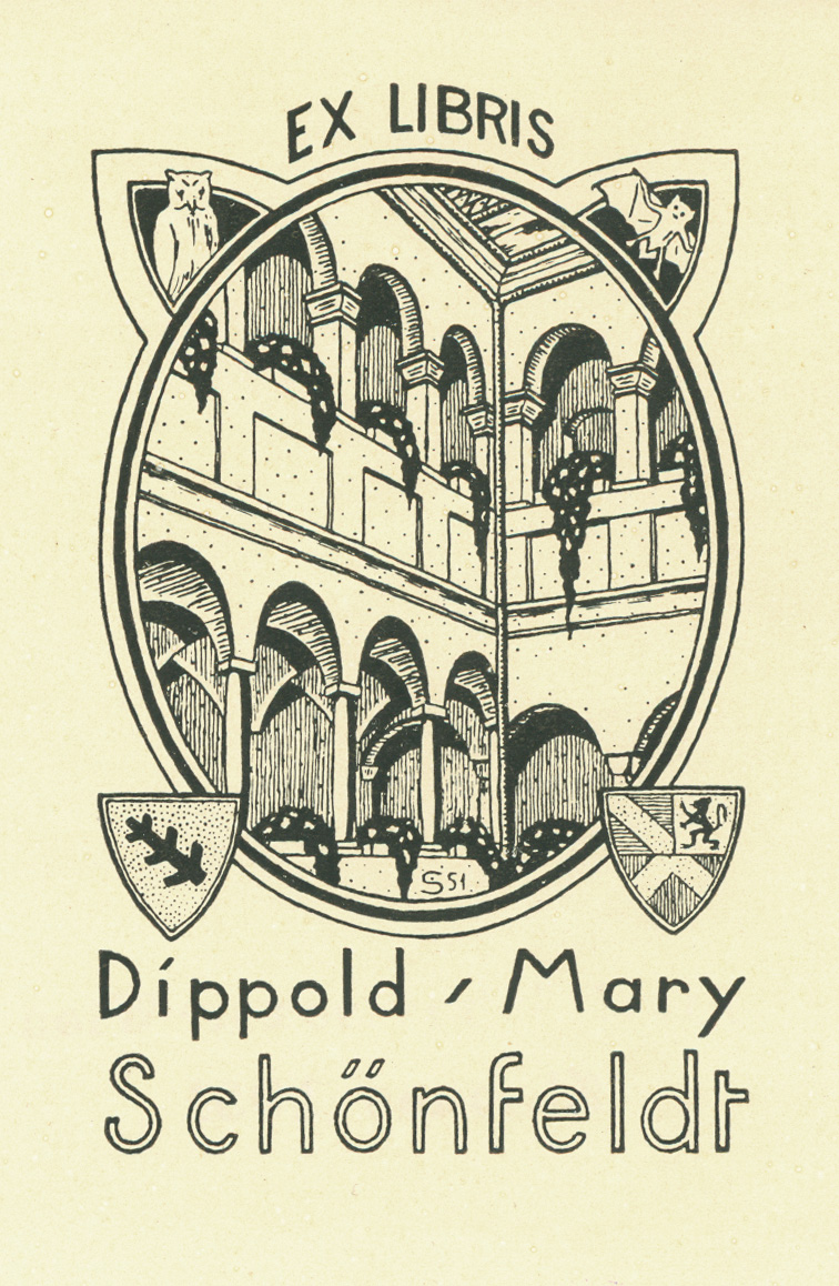 Joseph Sattler, Ex libris für Dippold - Mary Schönfeldt. Monogrammiert. Höhe 8; Breite 5 cm (Bild). Stempel auf Rückseite: Josef Schoenecker - Wien, Klischee, 1950